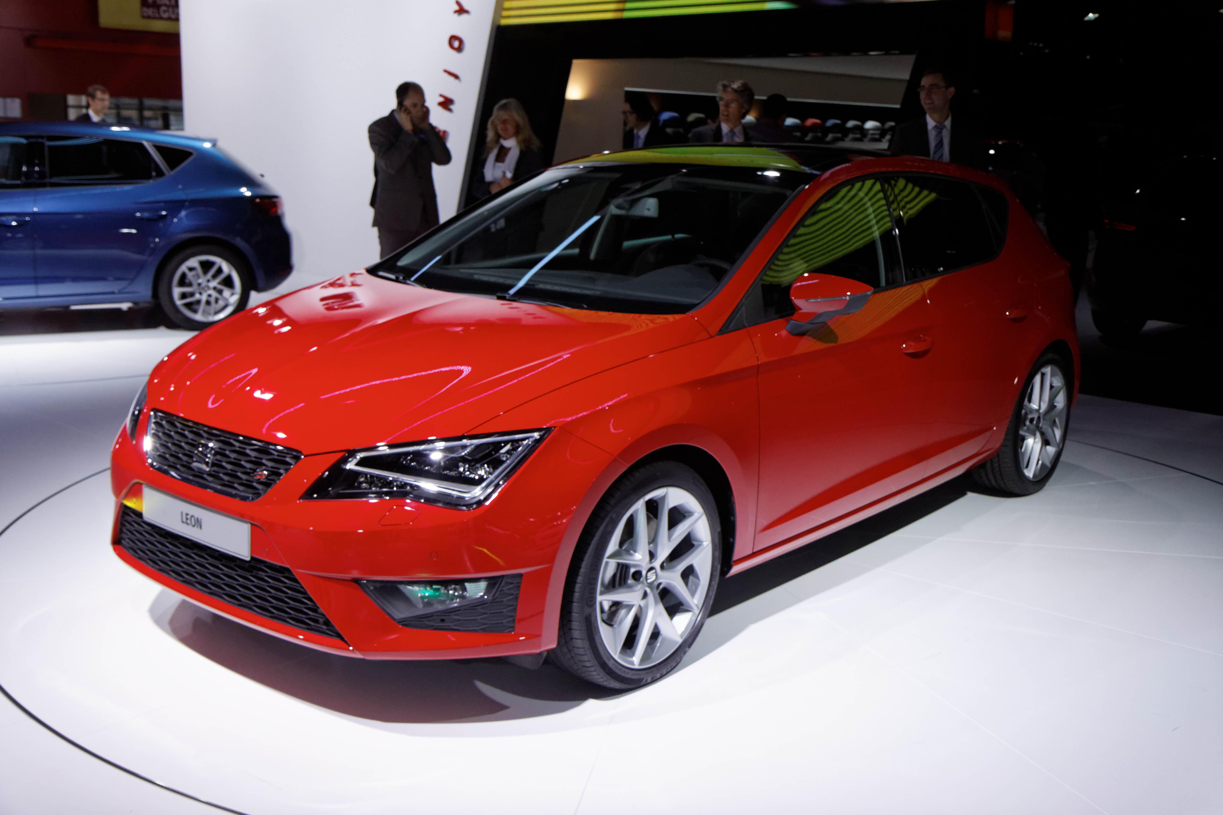 Une Seat Leon présentée lors du Mondial de l'Automobile de Paris 2012.